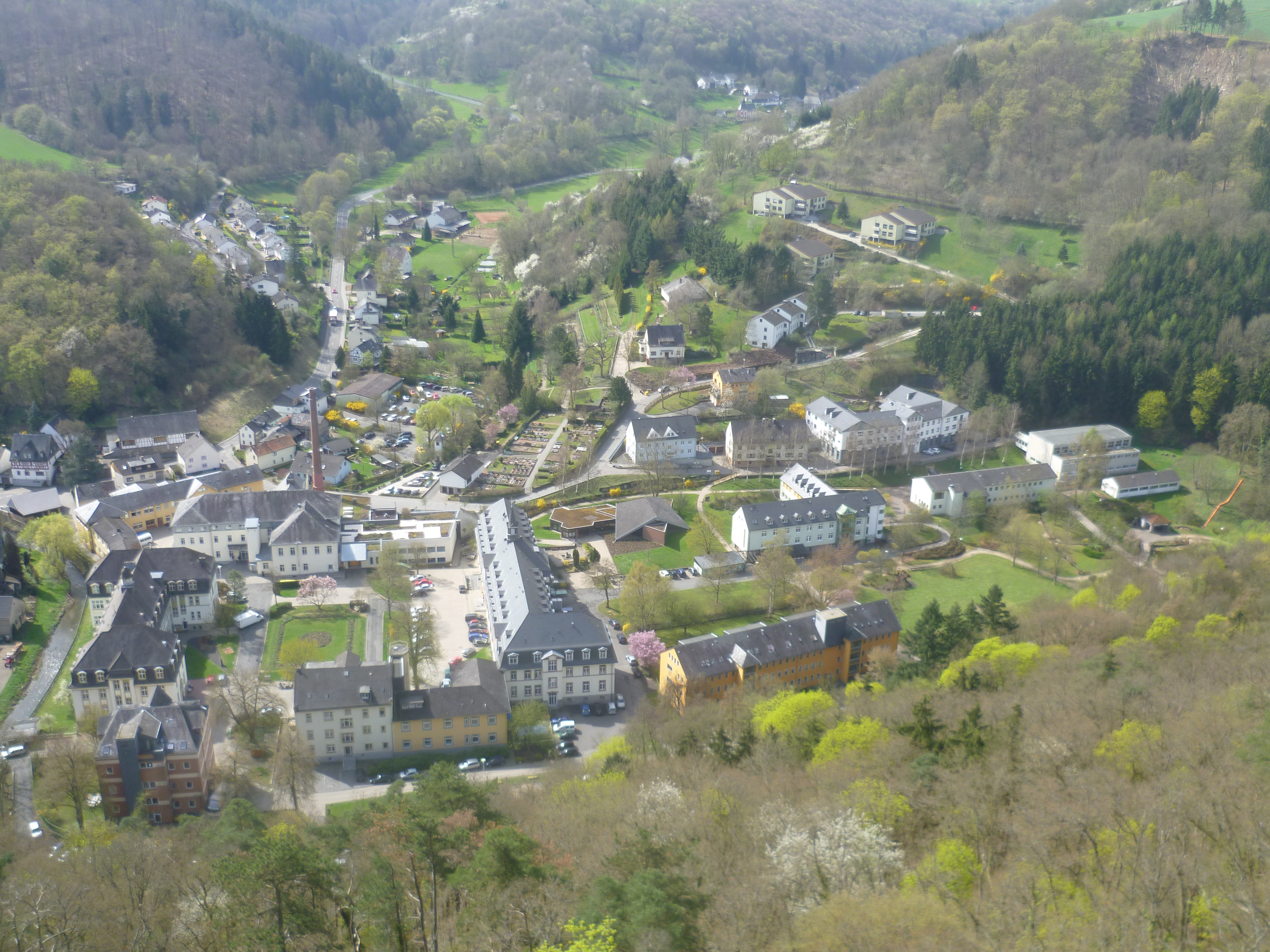 Überblick über die Heime Scheuern